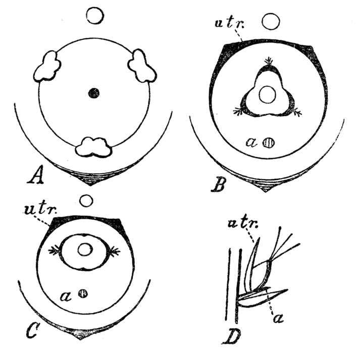 Flower diagram of Carex; A male; B female (dreinarbig); C female (zweinarbig); D Schema einer weiblichen Blüte// a = Secundarspross, utr = Utriculus